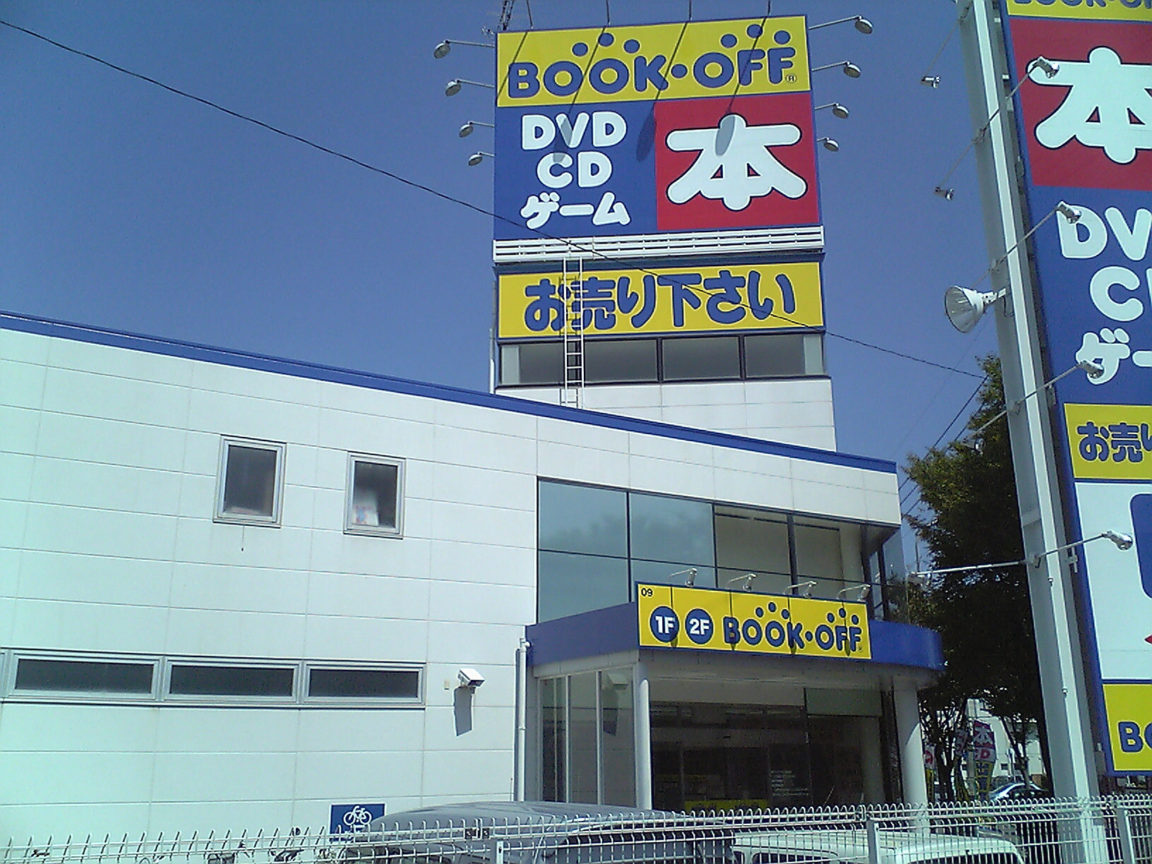 ブックオフ福岡飯倉店（福岡市早良区）